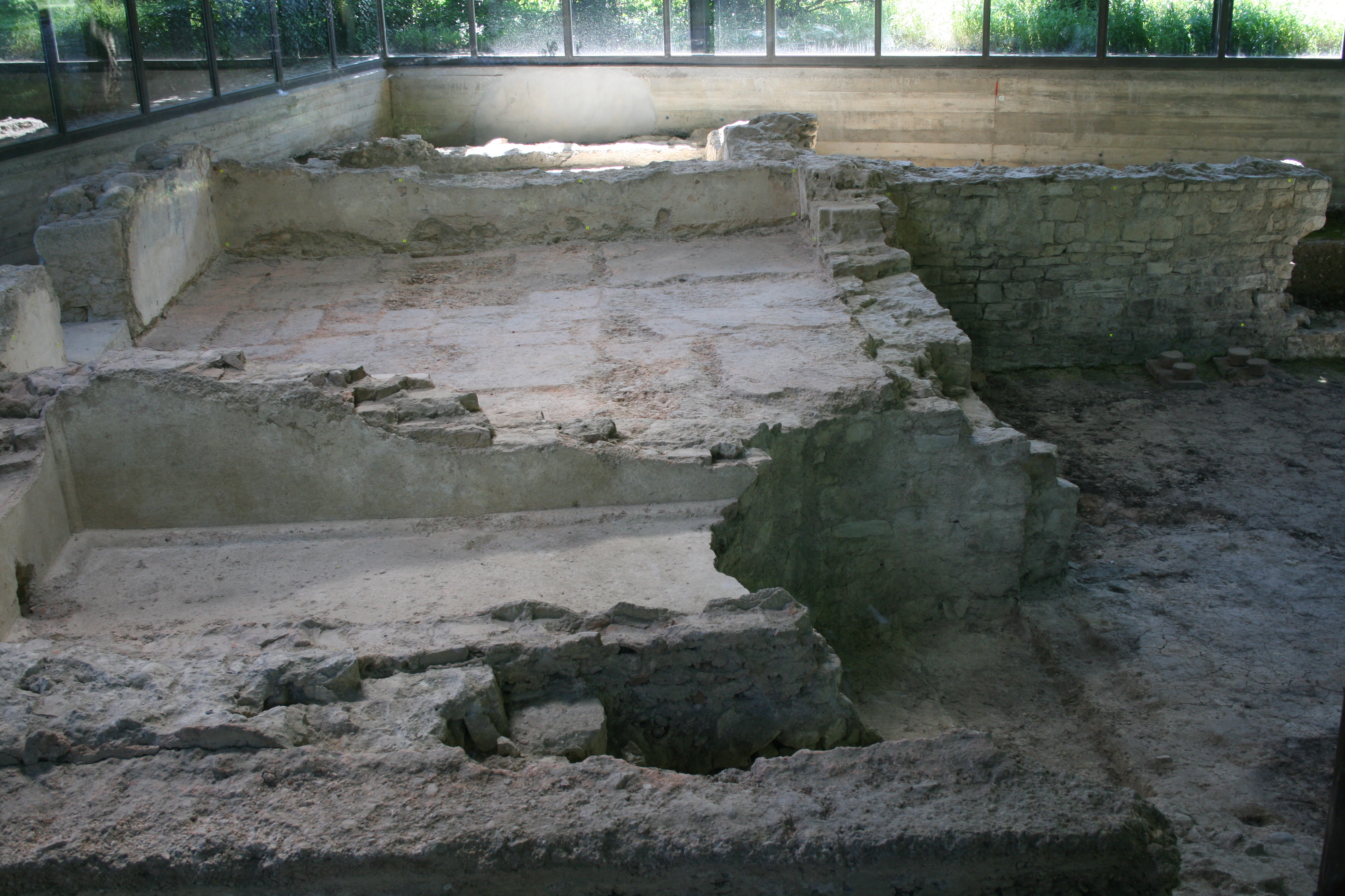 Ruinen des Bads des Legionslagers Vindonissa (Windisch), Schweiz